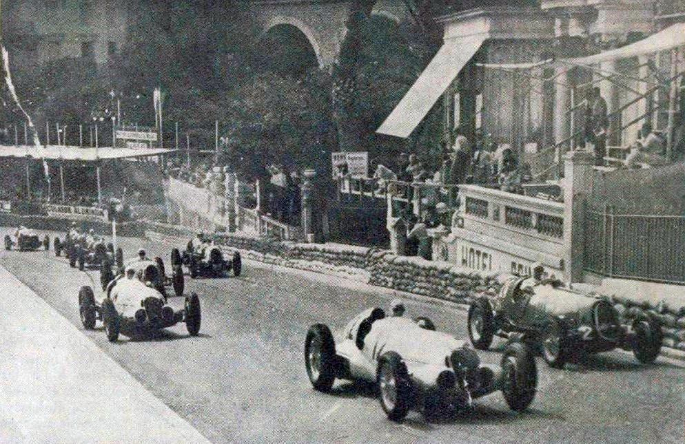 Grand Prix de Monaco 1937, dans la rampe de Sainte-Dévote.